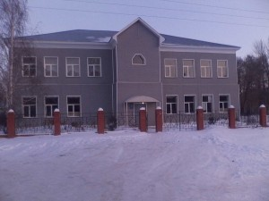 миловская средняя амбуратория